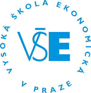 VSE Seal